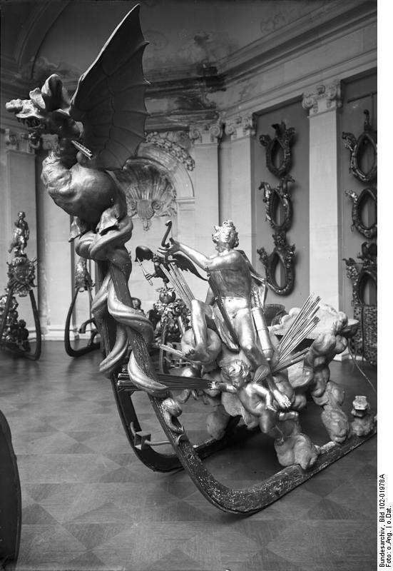 Museum Schloss Monbijou Prunkschlitten aus der Zeit Friedrichs I. um 1700